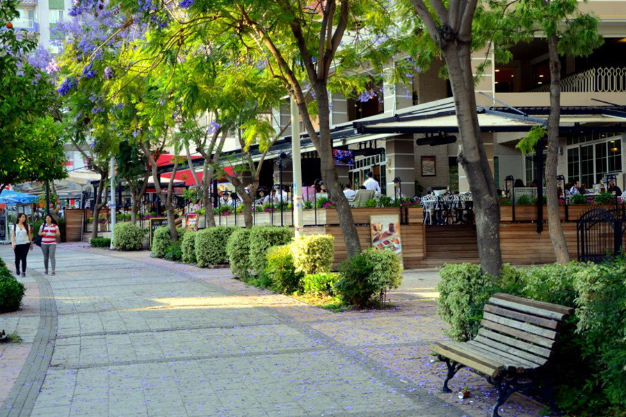 Özal'dan (Turgut Özal Blv.) bir görünüm. (foto: önens/wowturkey)